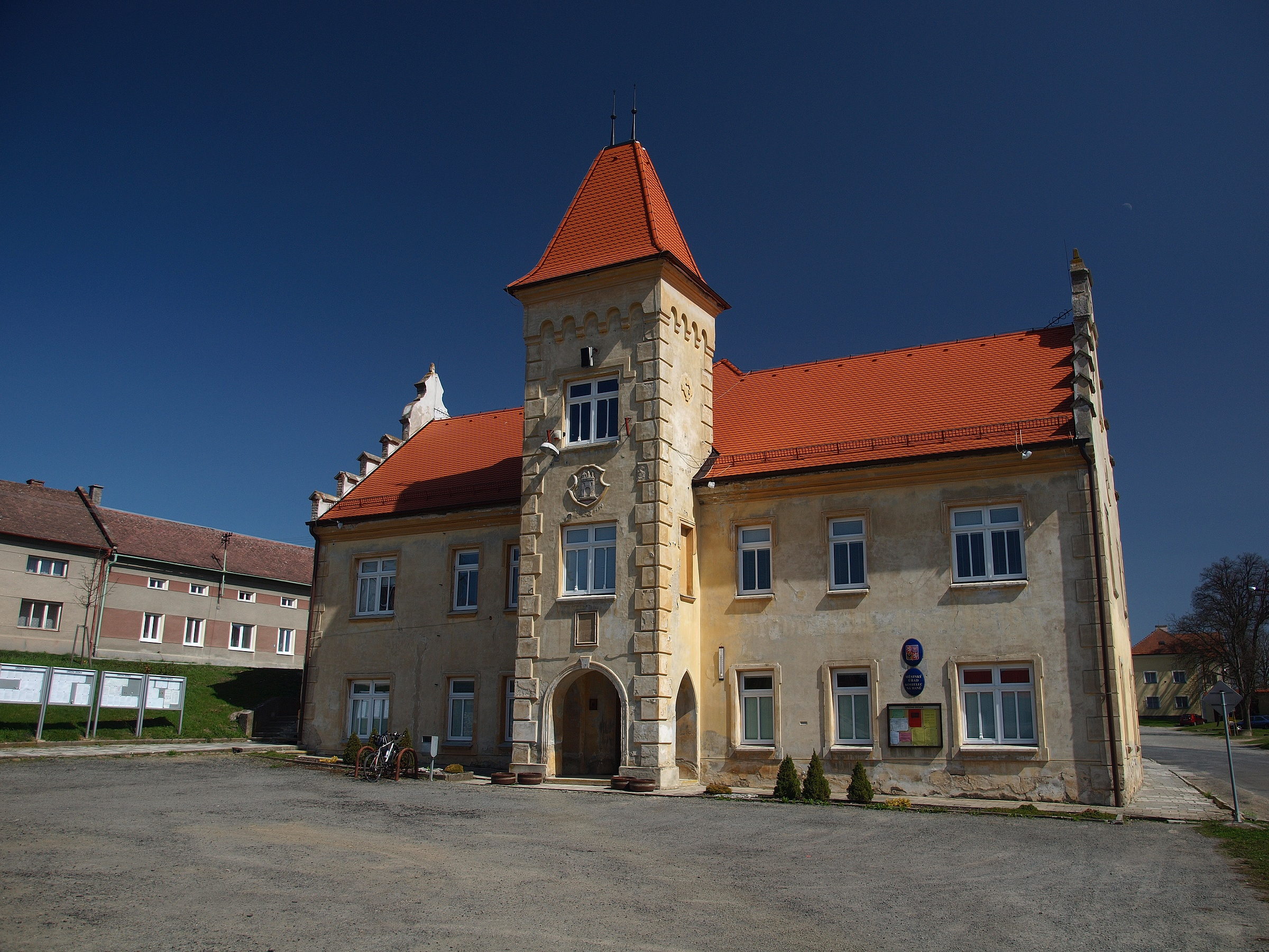 Kostelec na Hané, Jakubské nám. 138, radnice.